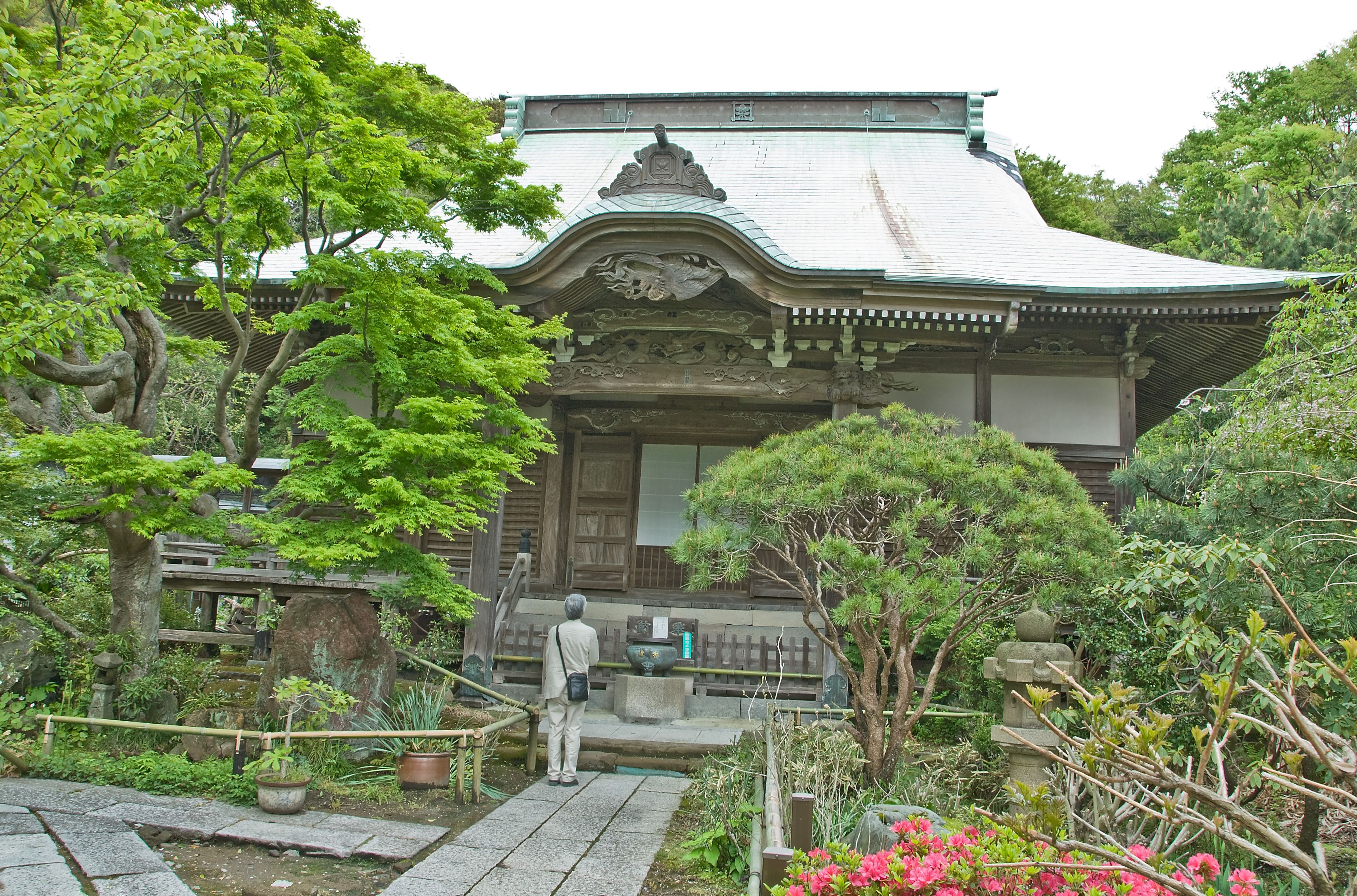 Main Hall, Myoho-ji, Kamakura